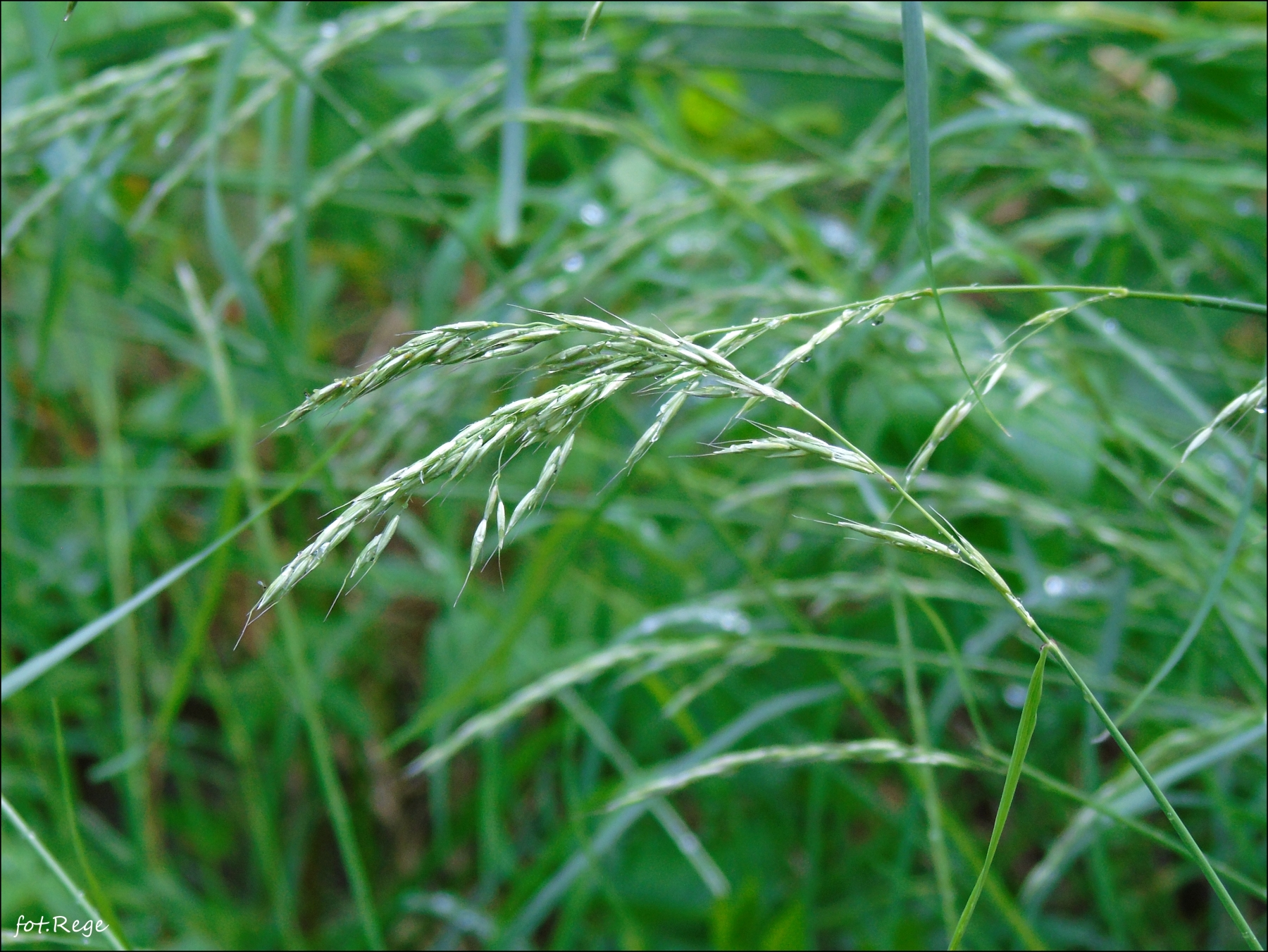 Kostrzewa olbrzymia